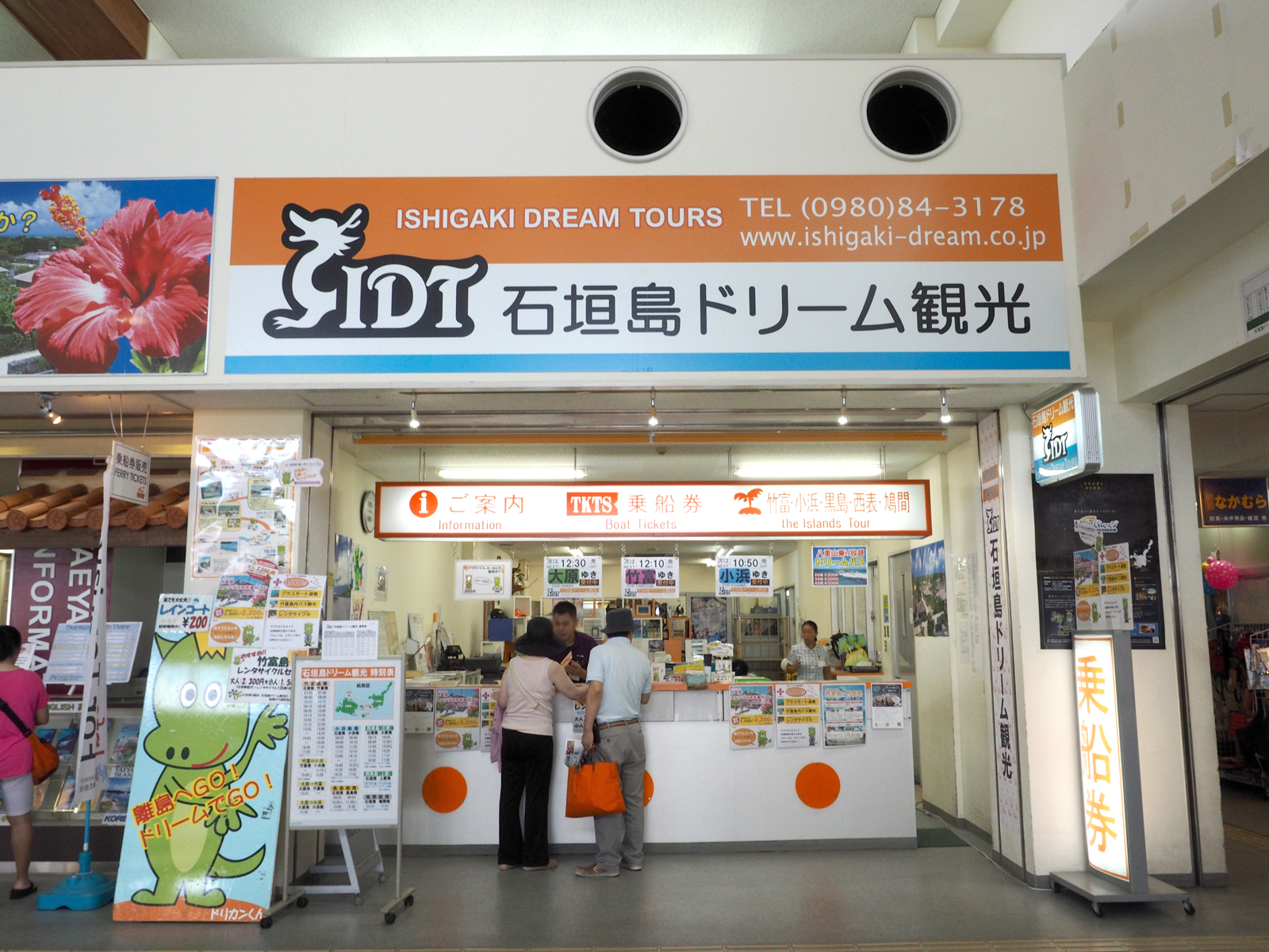 石垣島ドリーム観光事務所（沖縄県石垣市・石垣港離島ターミナル）